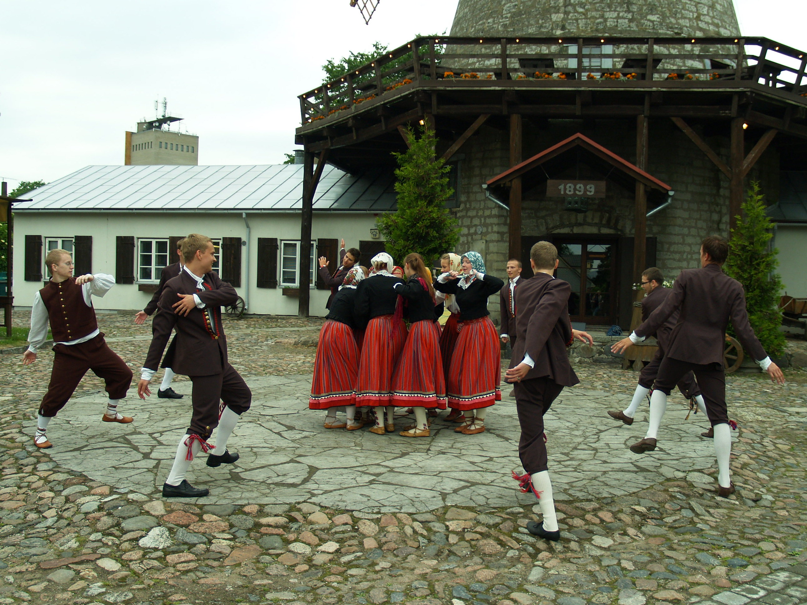 Kontsert Kuressaares. Esitamisel on Polka burlesk.